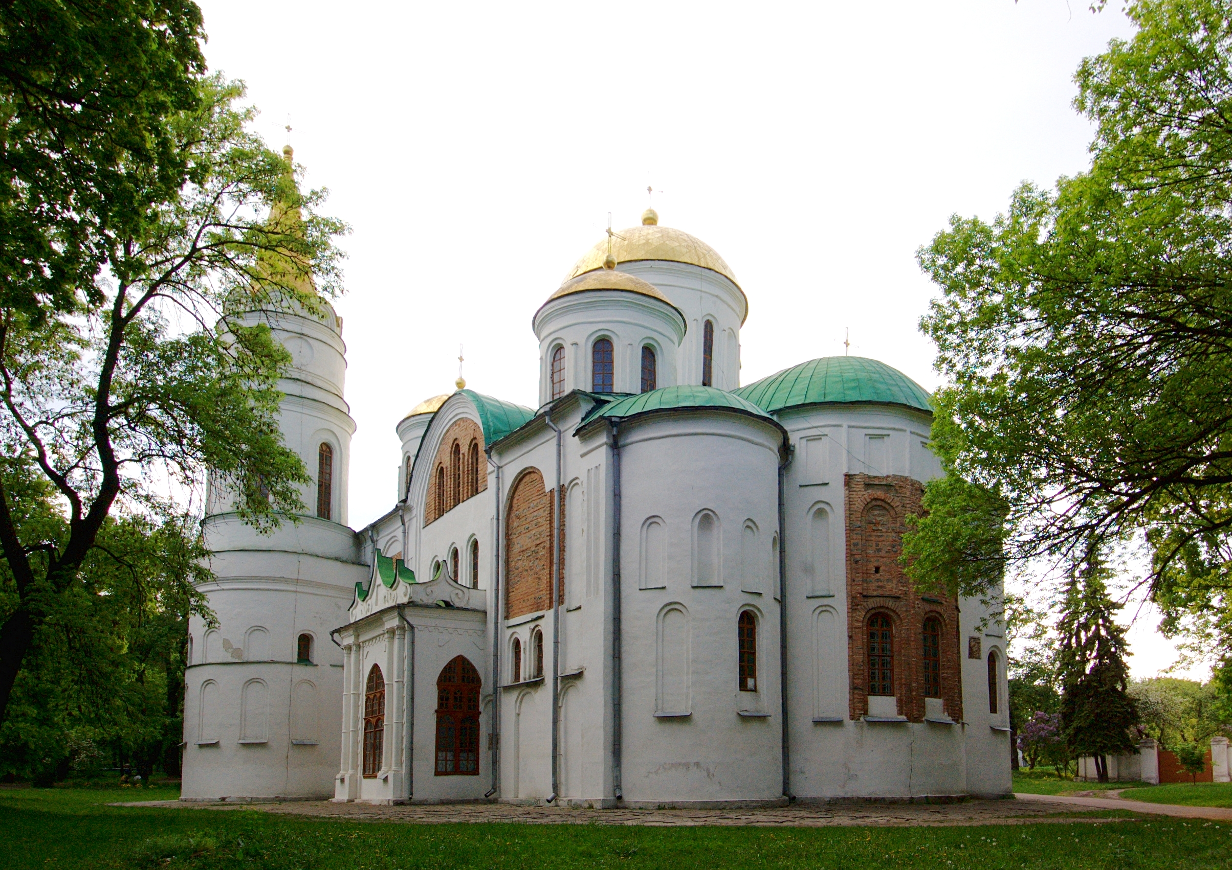 Спасо-Преображенський собор у Чернігові. Задній план.